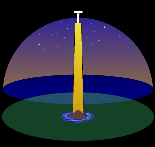 Maailman rakenne suomalaisessa mytologiassa. Perustuu E.N Setälän kirjaan sammon salaisuus (1932). Lisätty pyörre ja maailmanvuori. Structure of universe in Finnish mythology. My own drawing based on book of E.N Setälä (1932). Added the whirld and mountain.